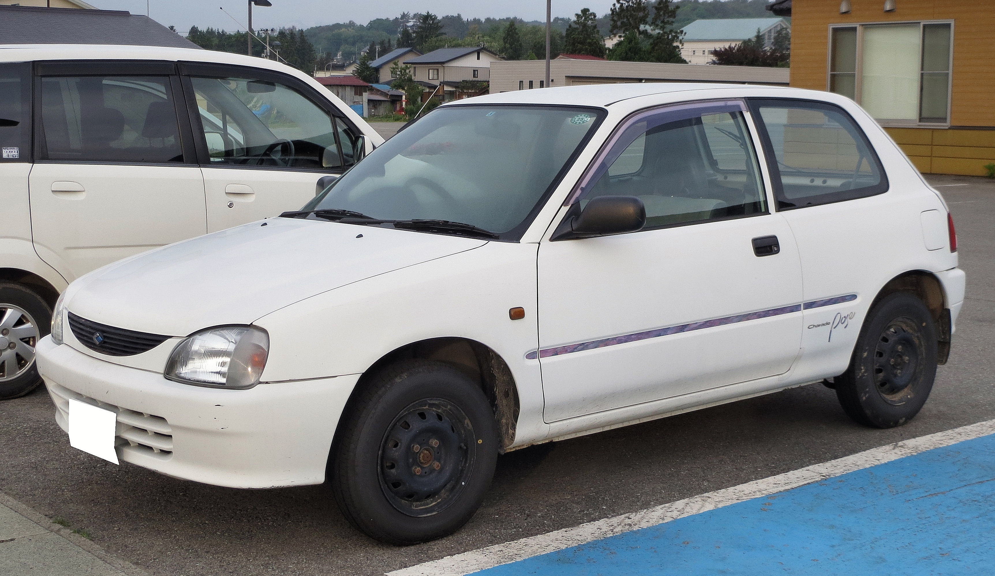 ダイハツ シャレード ポゼ 4WD